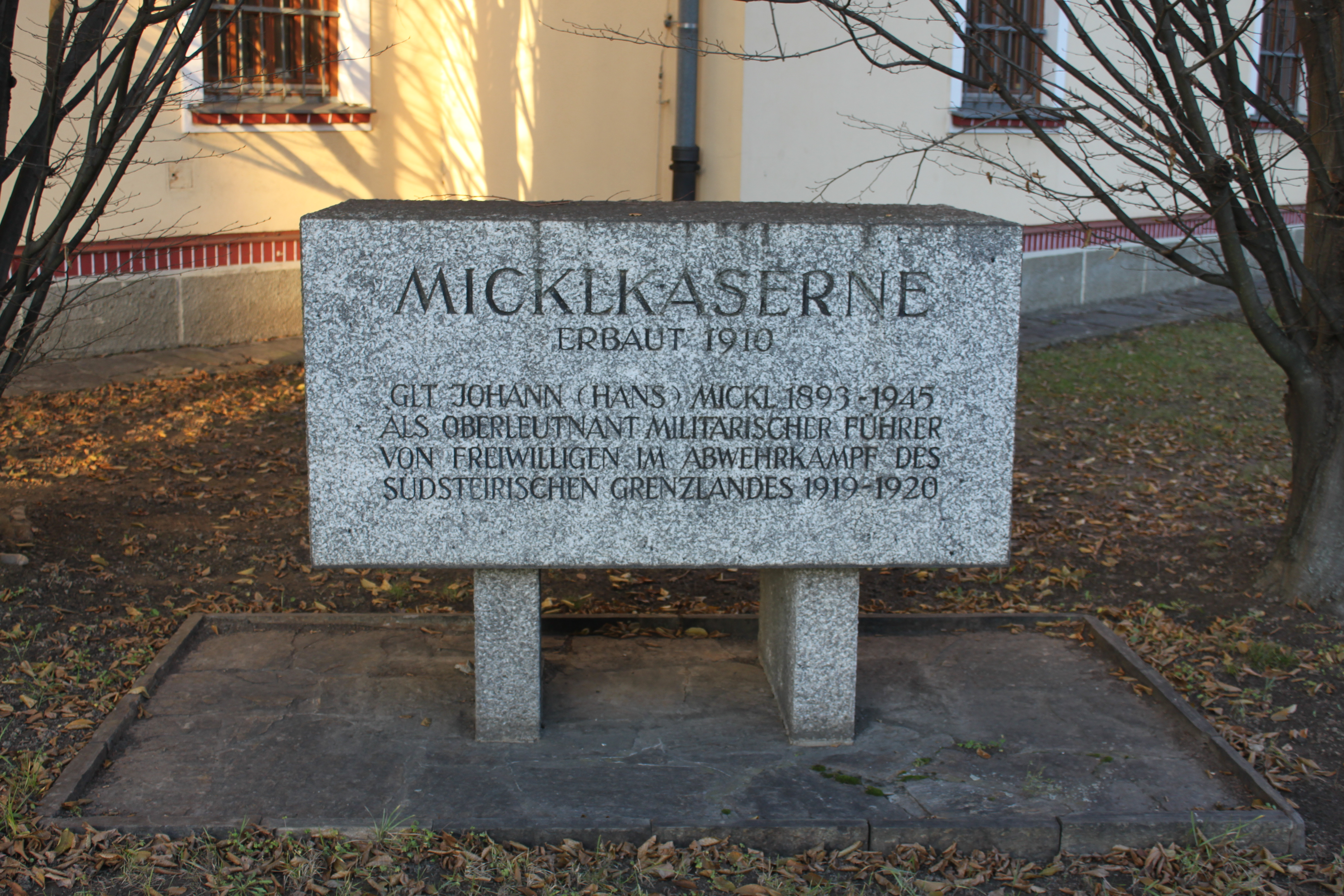 Mickl-Kaserne mit ehem. Stallungen, Hauptfront Plaschenaustraße, mittig gesetzte einfache Eingangstüre, rechts daneben Steinblock mit Erklärungen zur Kaserne